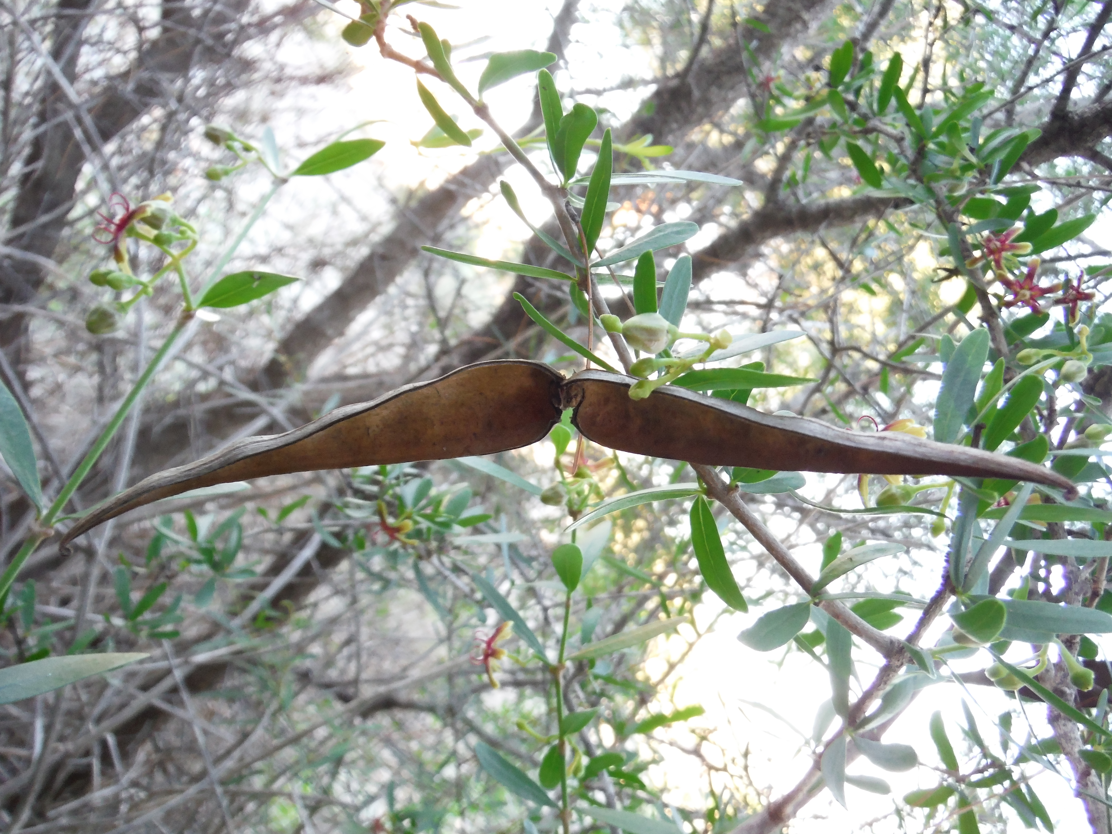 Periploca laevigata près de Torre-Pacheco en Espagne.